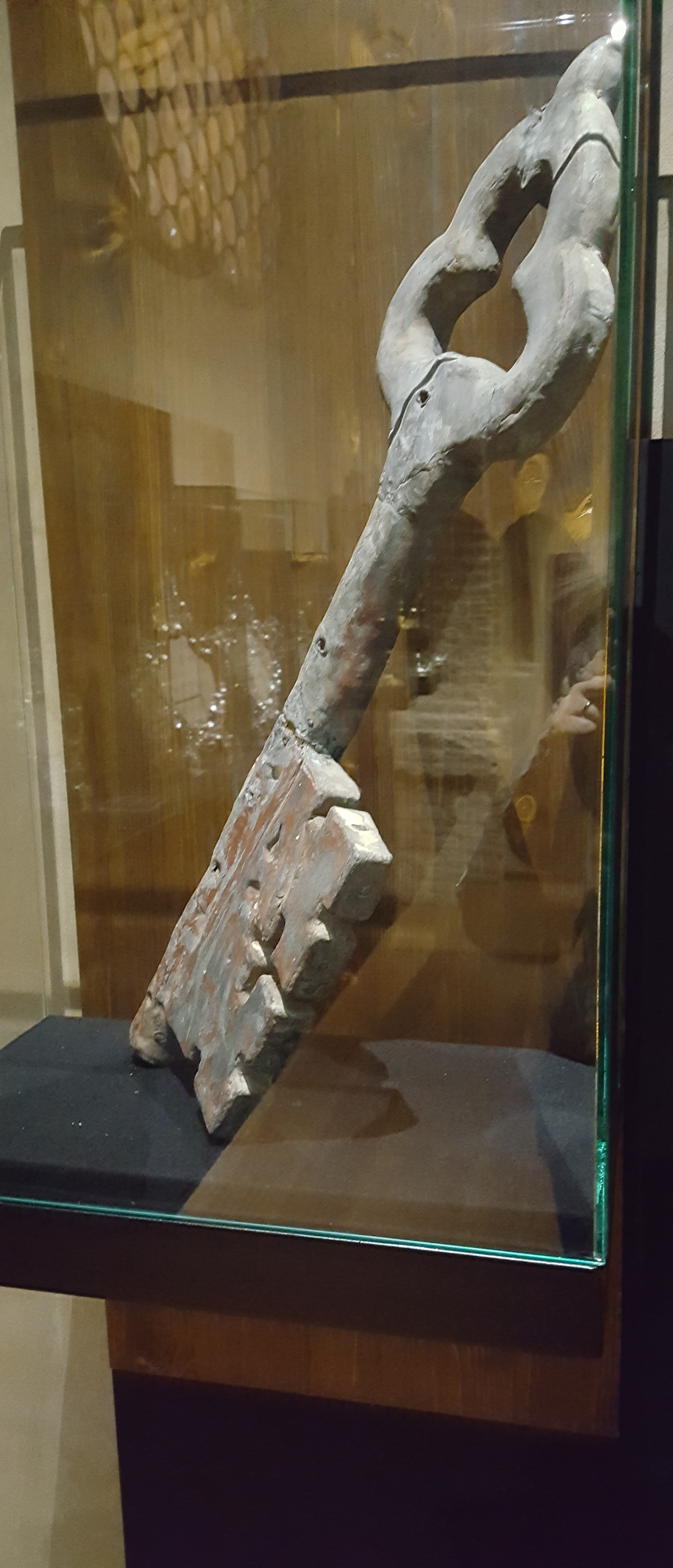 Secolo XVIII